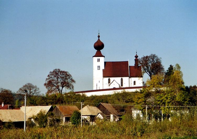 Church in Žehra (Slovakia) Foto: cds